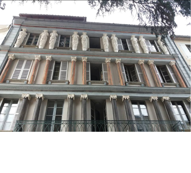 façade en plâtre 1835 Ariège CARIATIDES Foix